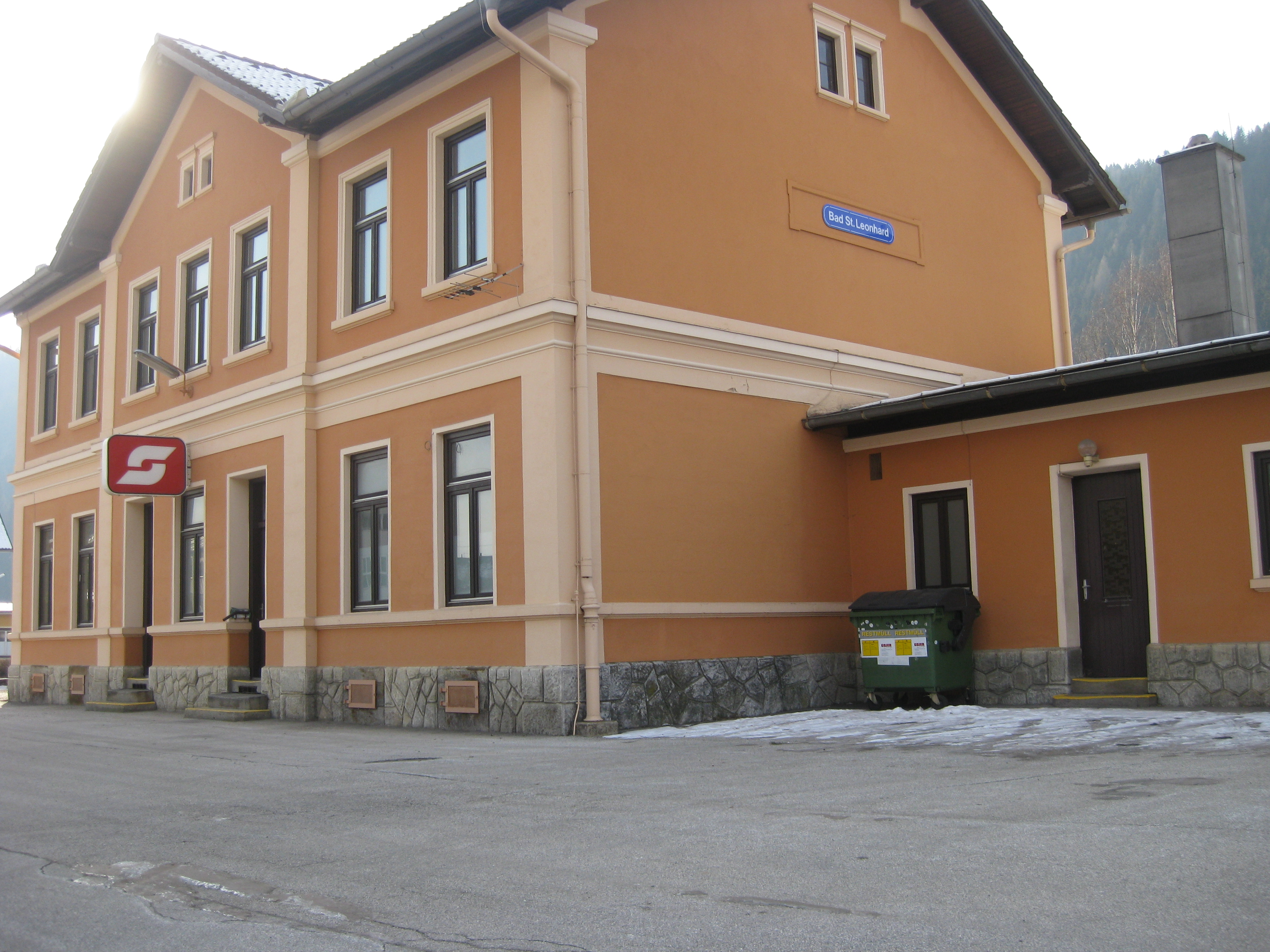 Der Bahnhof Bad St. Leonhard im Lavanttal an der Lavanttalbahn